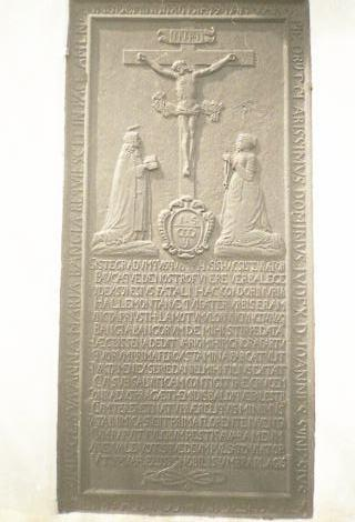 Grabplatte an der Pfarrkirche in Hallenberg (Hochsauerlandkreis)